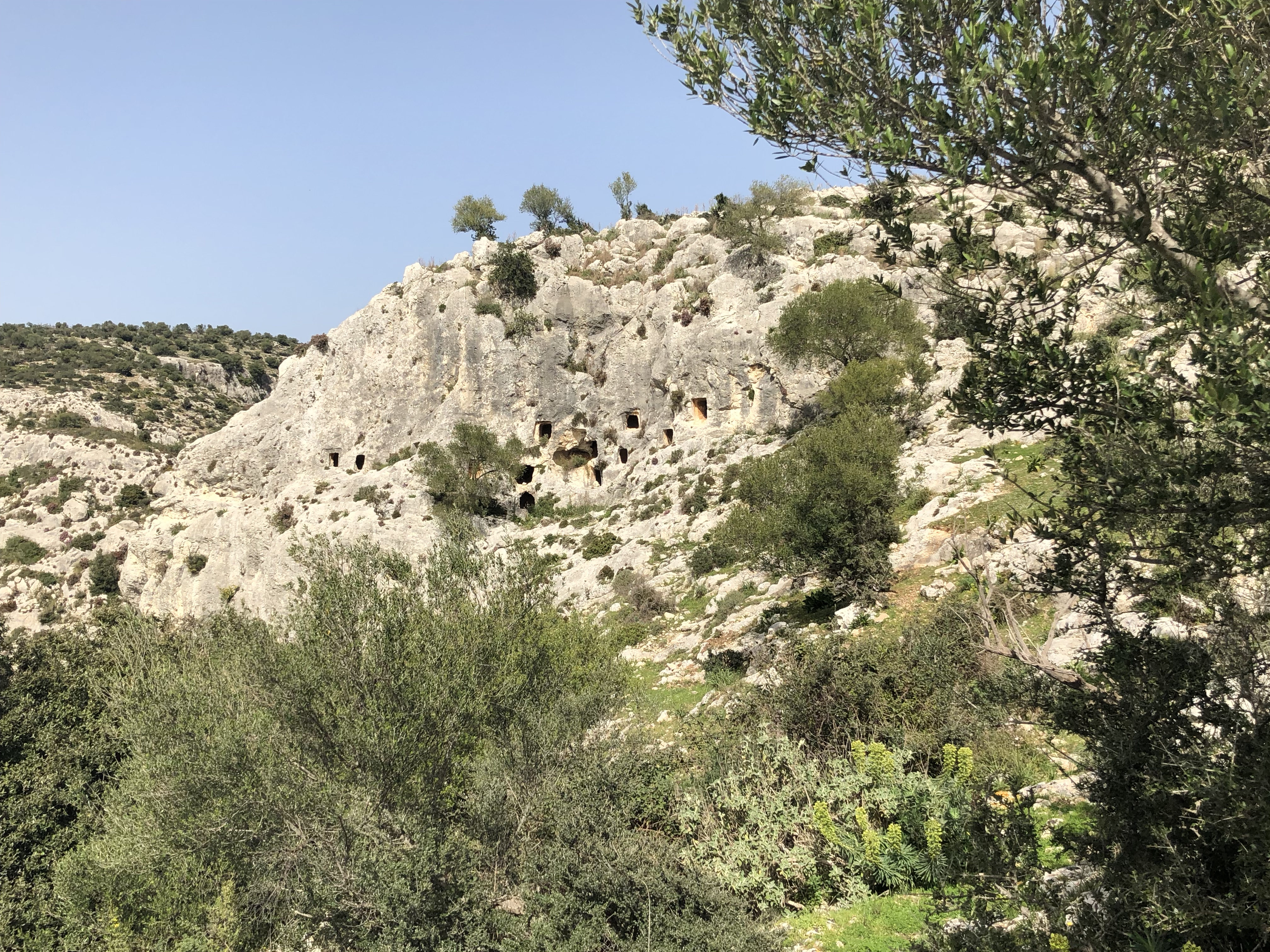 Tombe facies Pantalica a Cugno Case Vecchie